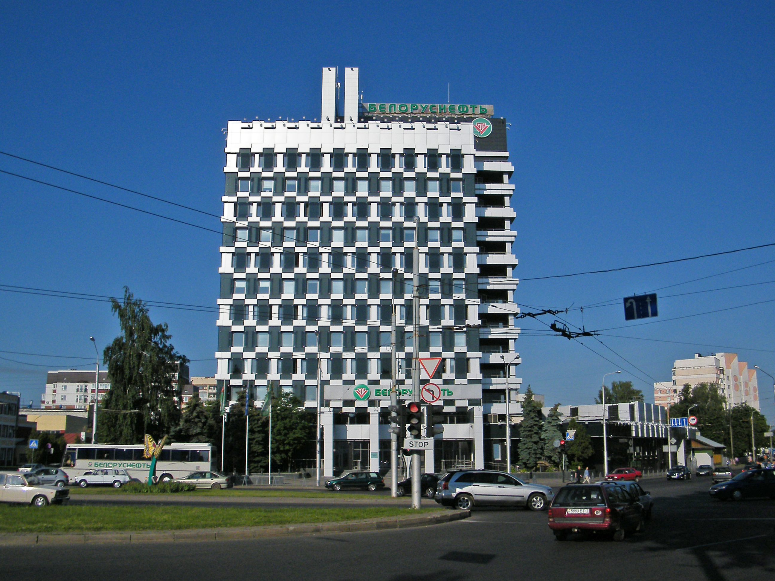 ПО "Белоруснефть"